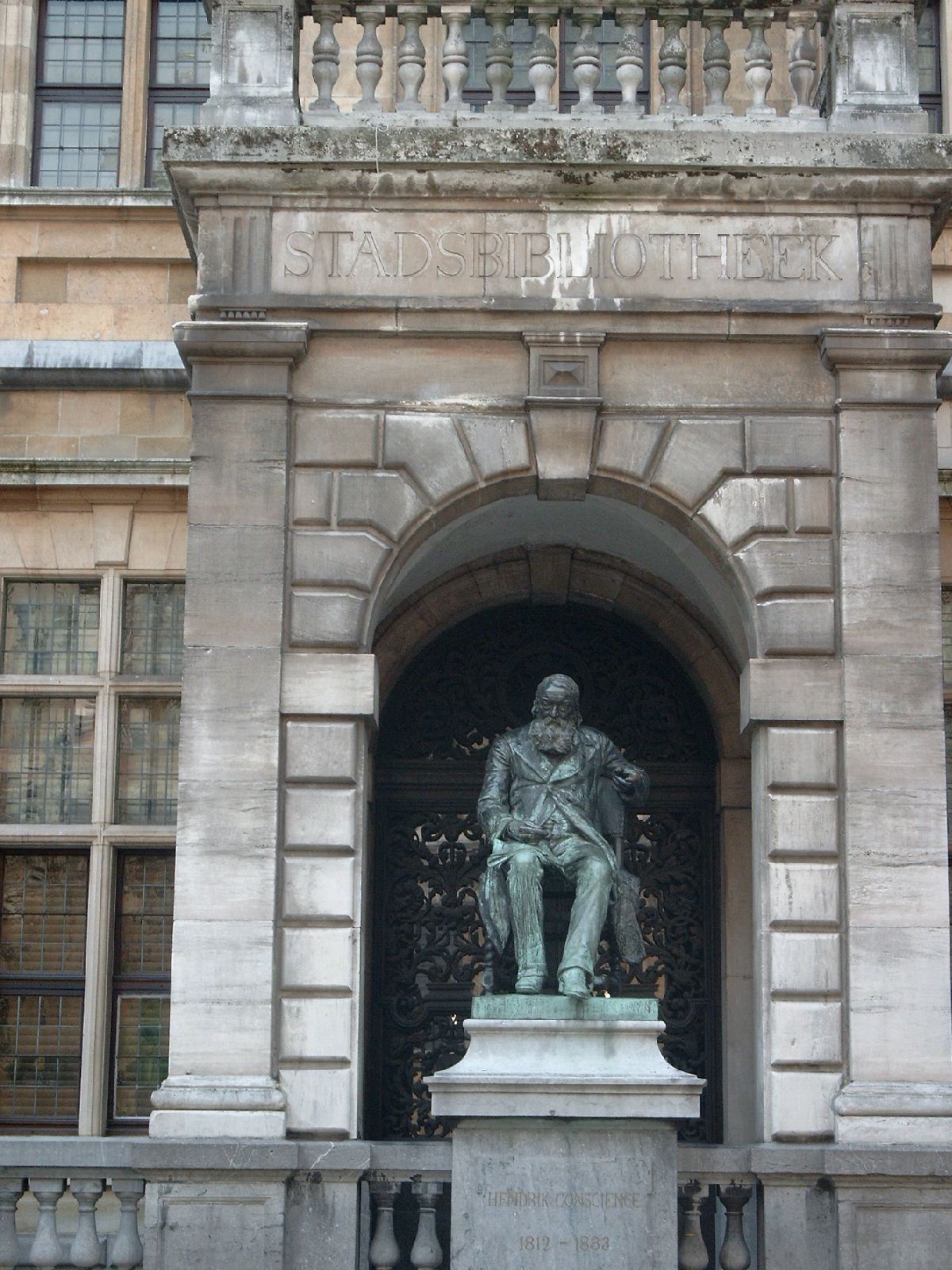 standbeeld H. Conscience voor Stadbibliotheek, Antwerpen